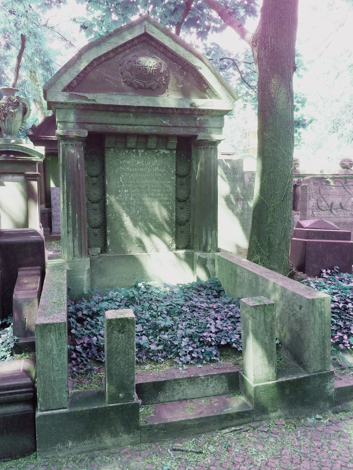 Isidor Loewe war ein führender Unternehmer im Kaiserreich und Mitinhaber der Firma Ludwig Loewe